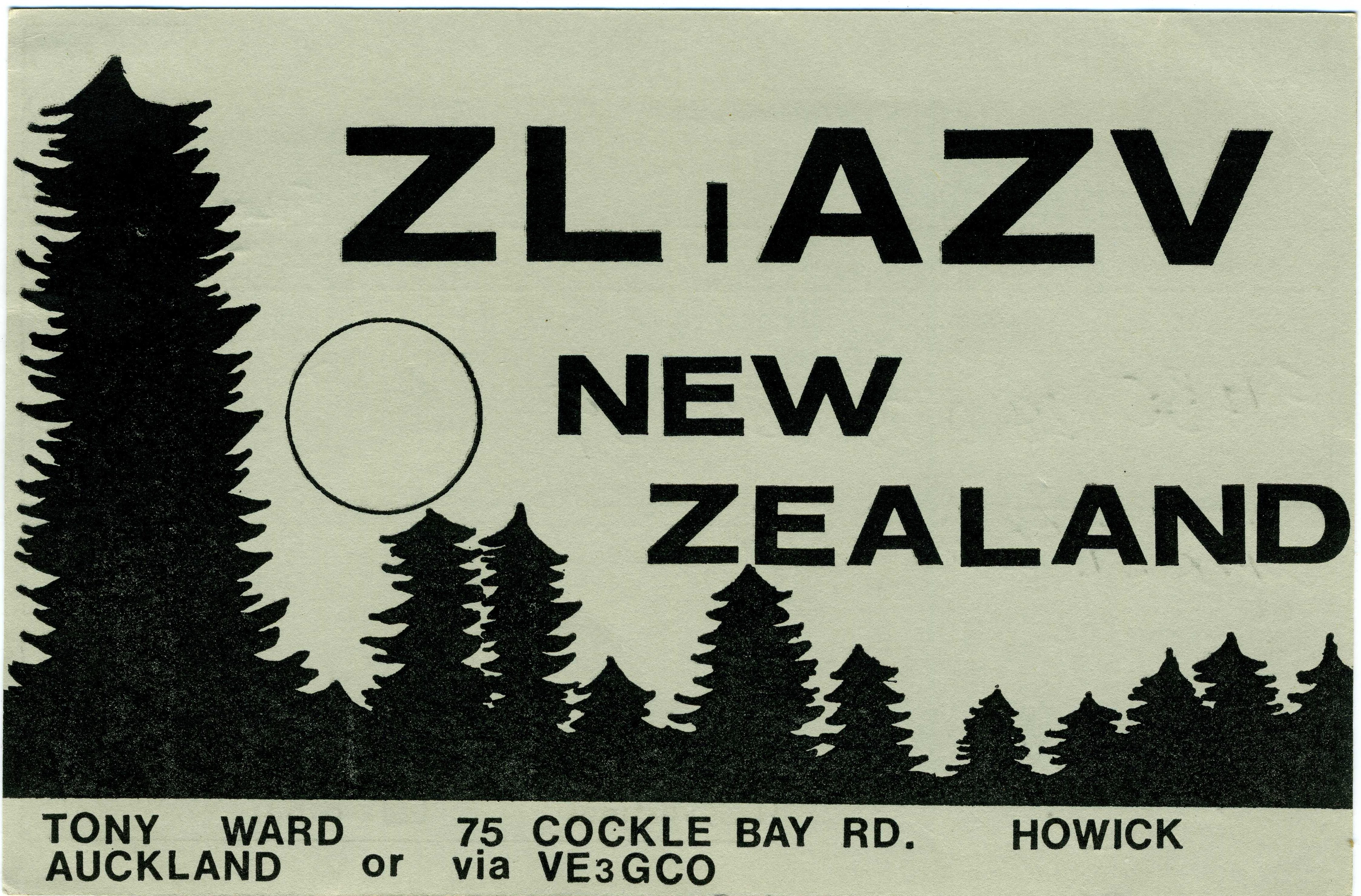 Carte QSL de ZL1AZV (Nouvelle Zélande)